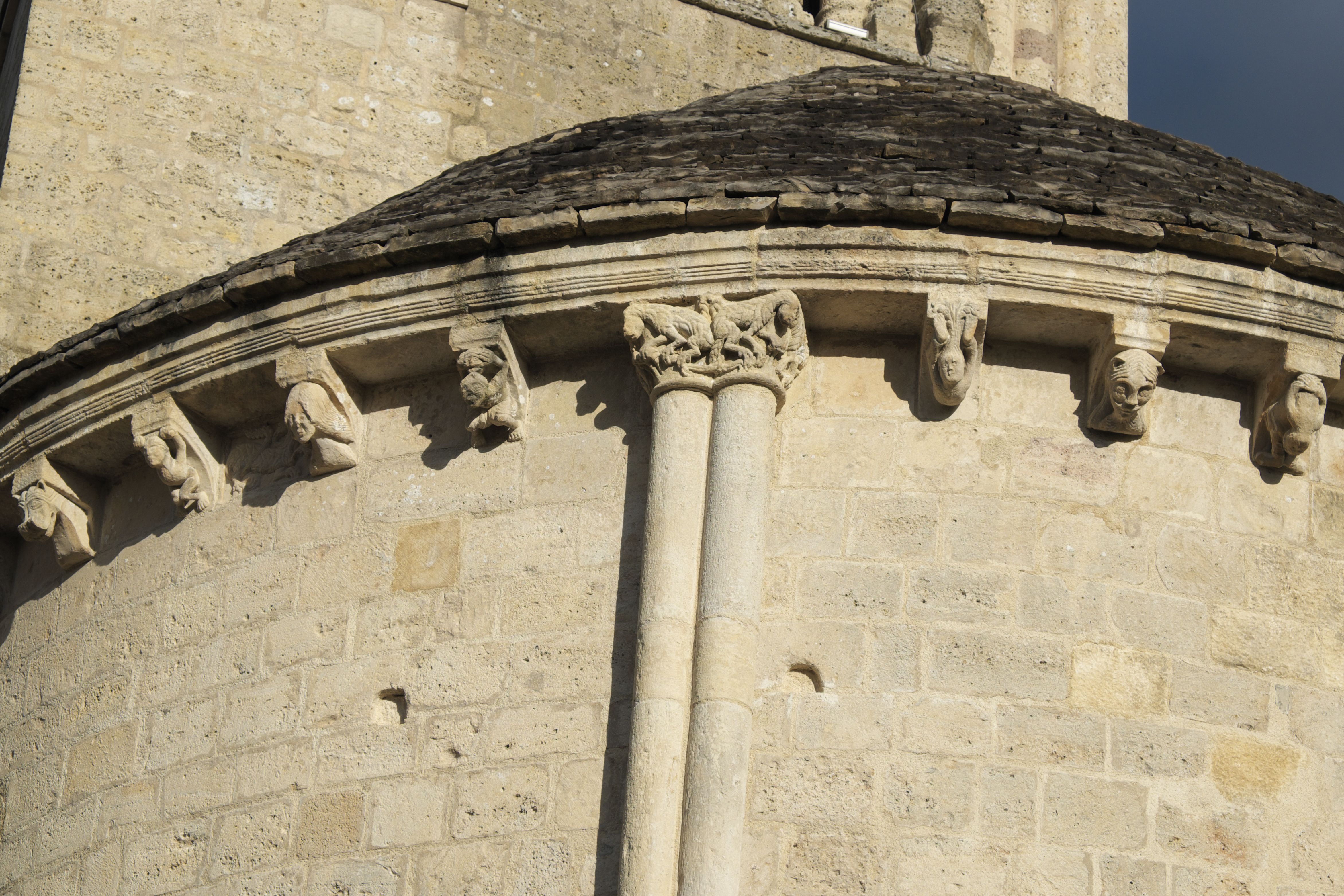 Katholische Kirche Notre-Dame-de-l’Assomption in Surgères im Département Charente-Maritime (Nouvelle-Aquitaine/Frankreich), Kragsteine unter dem Dachansatz